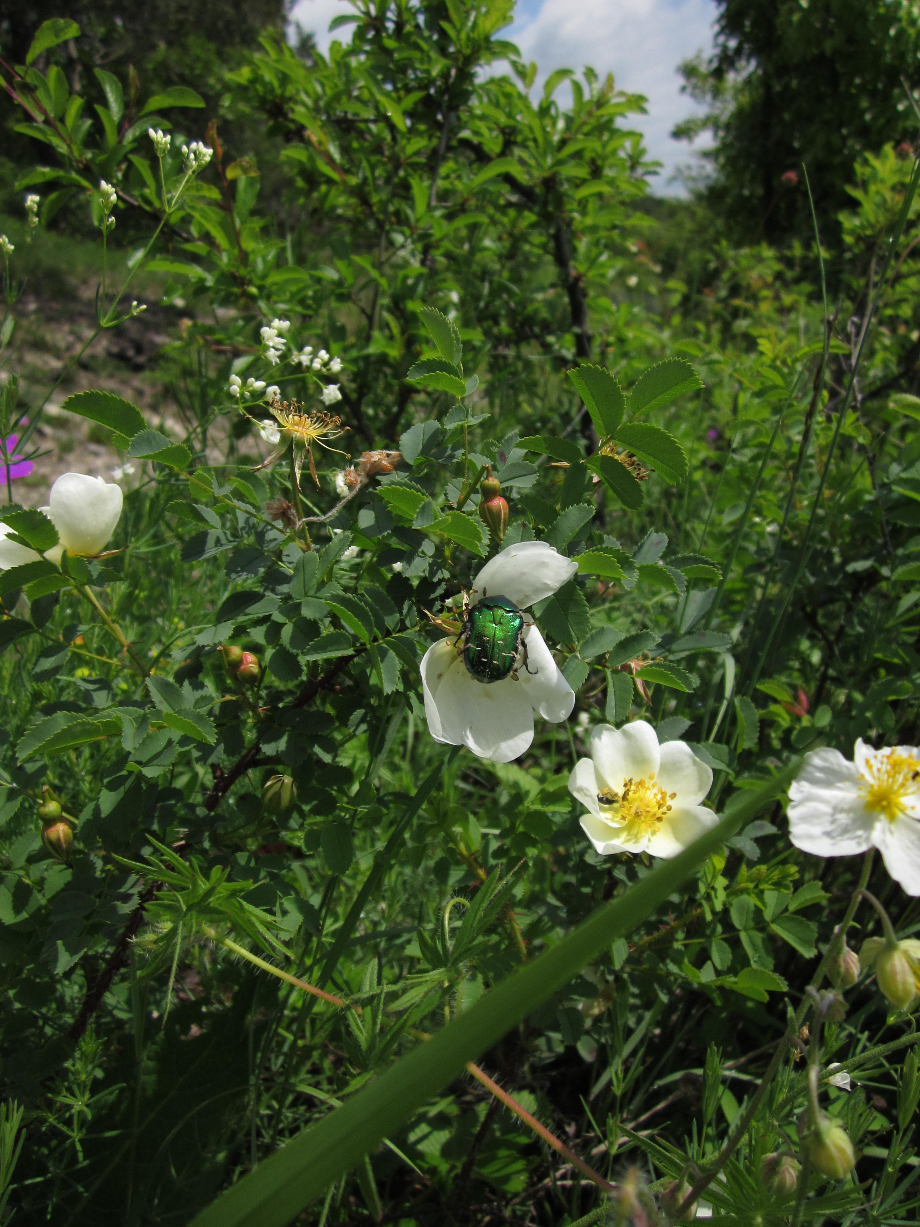 NSG Grainberg-Kalbenstein und Saupurzel - Grüner Käfer auf Heckenrosen-Blüte